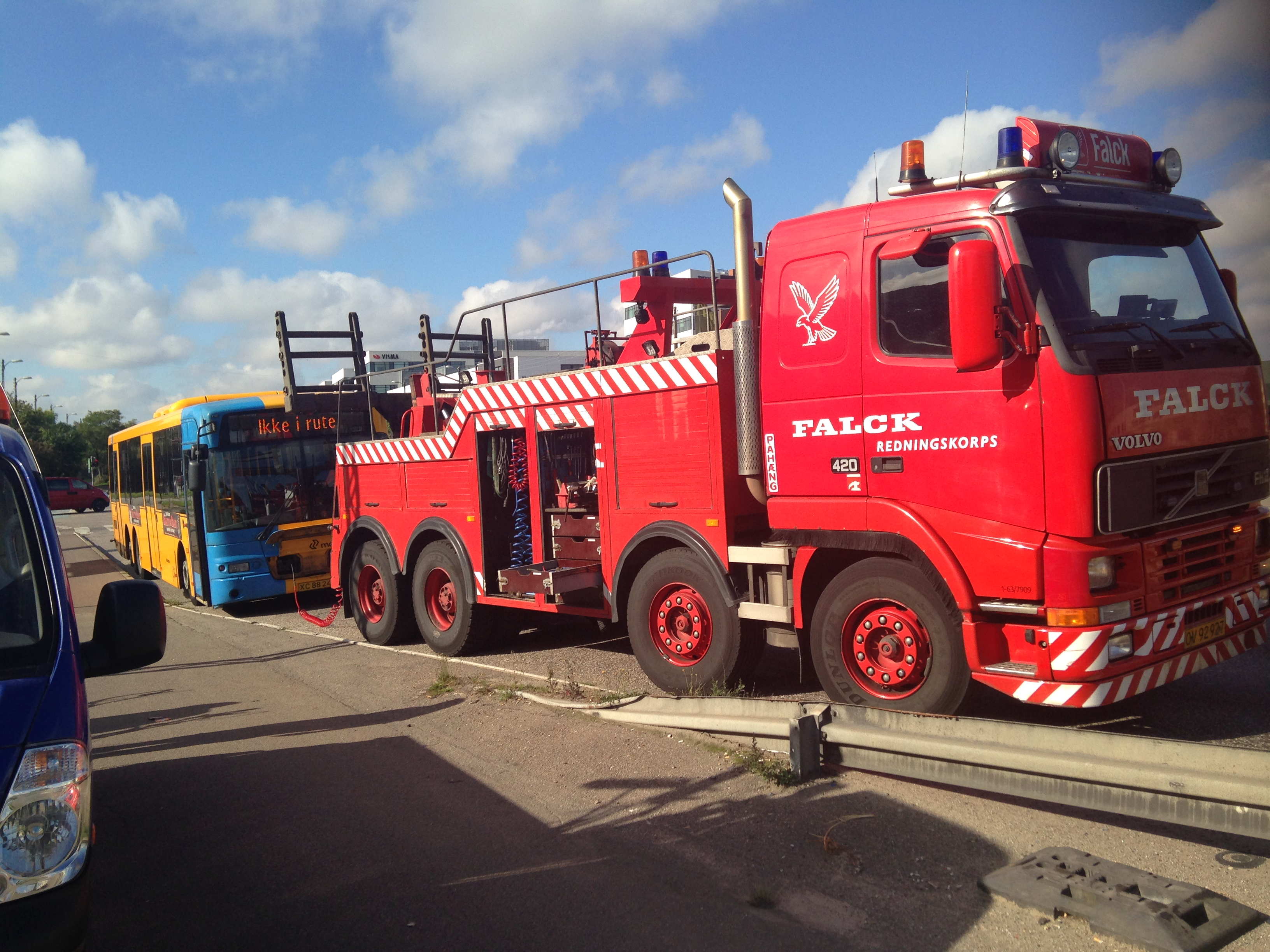 En kranbil fra Falck som slæber en Movia bus